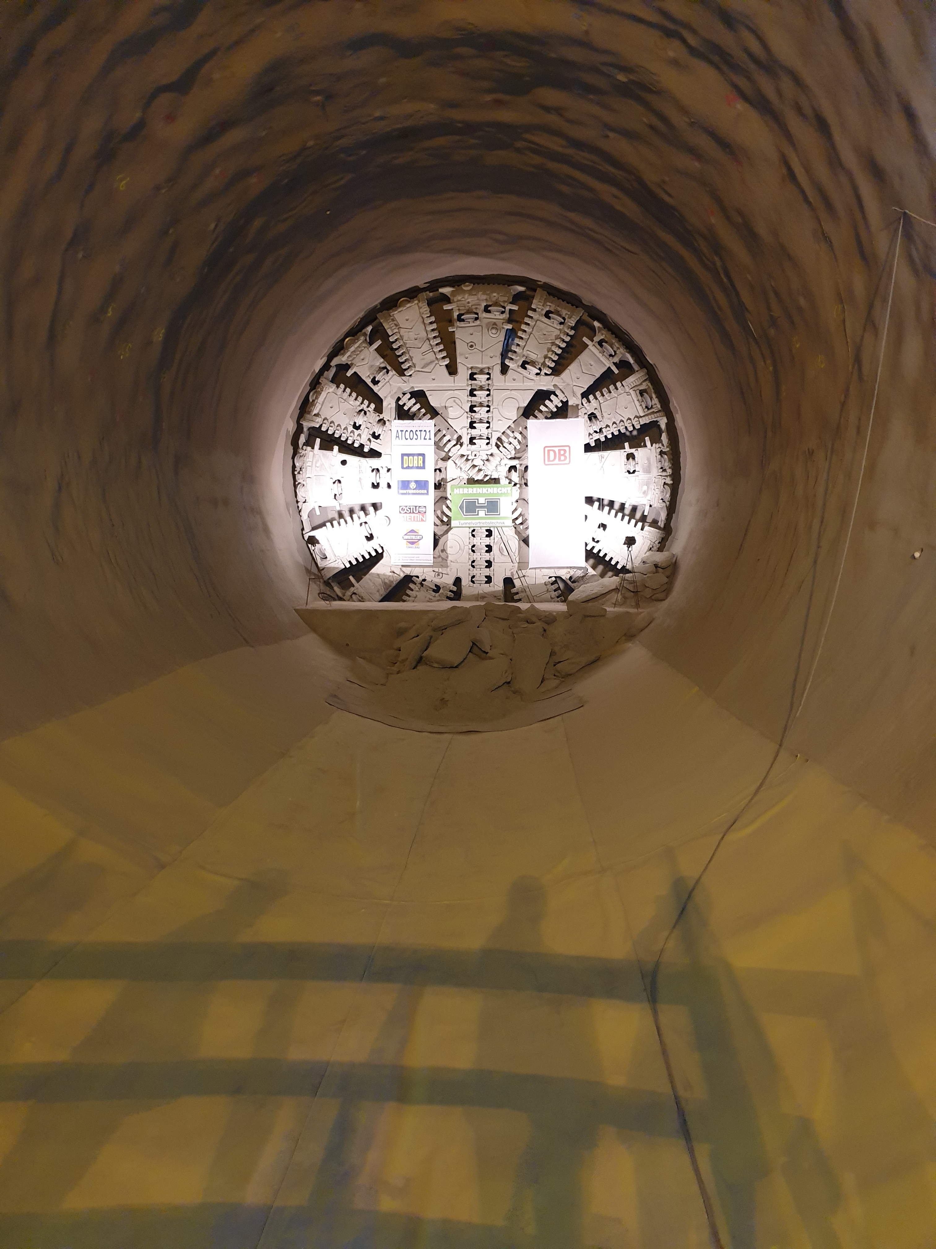 Blick auf das Schneidrad der Tunnelvortriebsmaschine, nach Ende der vierten und letzten Schildfahrt des Tunnels.